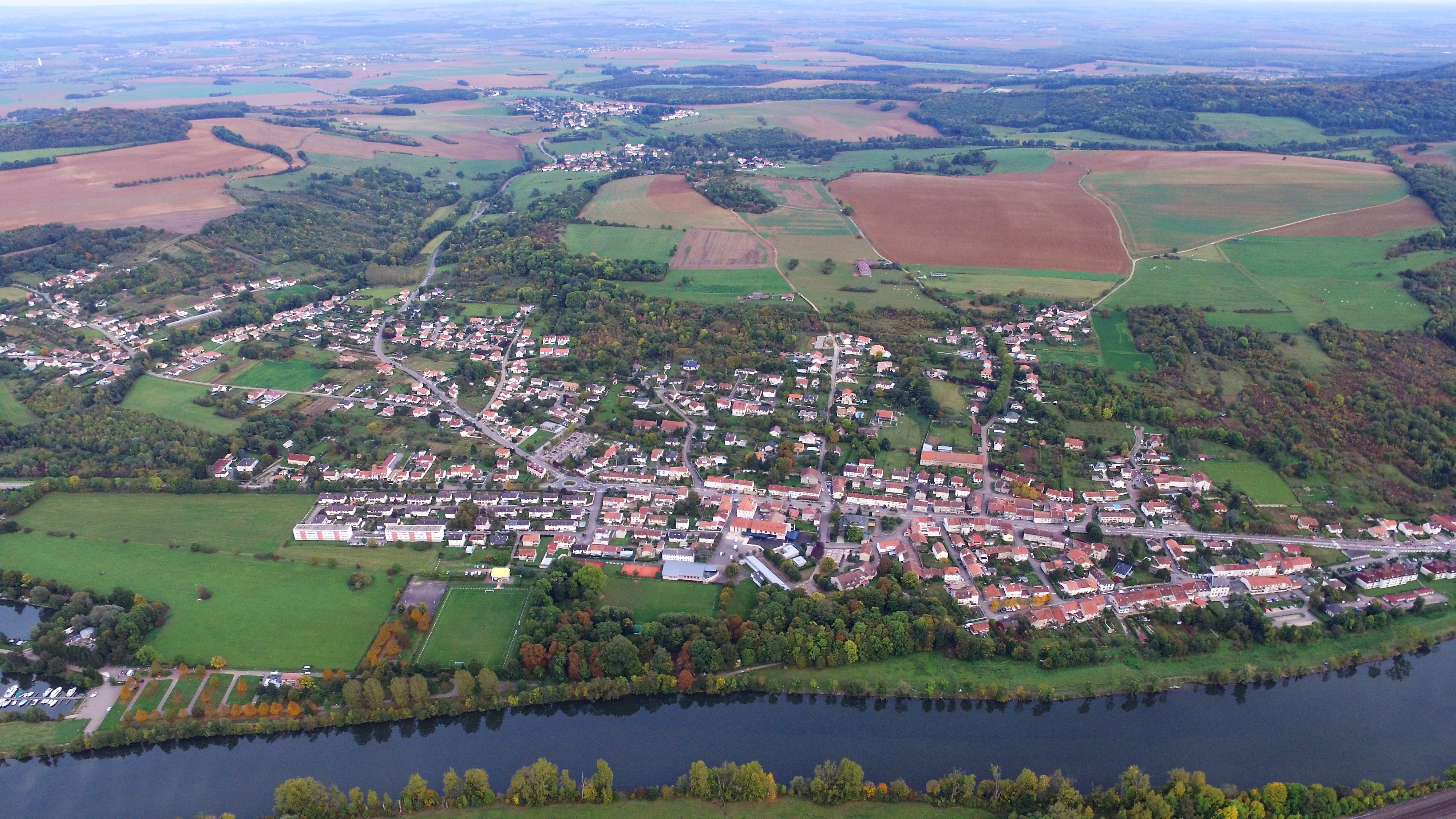 Vue aérienne Corny sur Moselle F57680